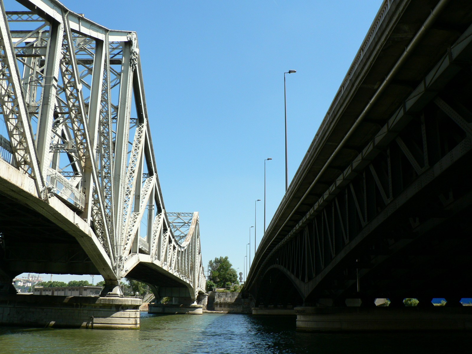 Ponts de Lyon- Viaducs routier-ferroviaire de la Mulatière